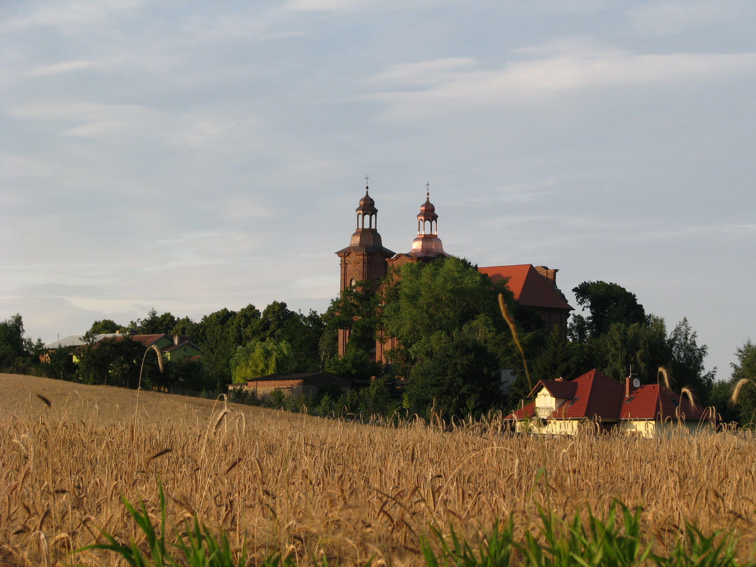 Widok na Lądek od strony doliny Warty, wieże kościoła św. Mikołaja